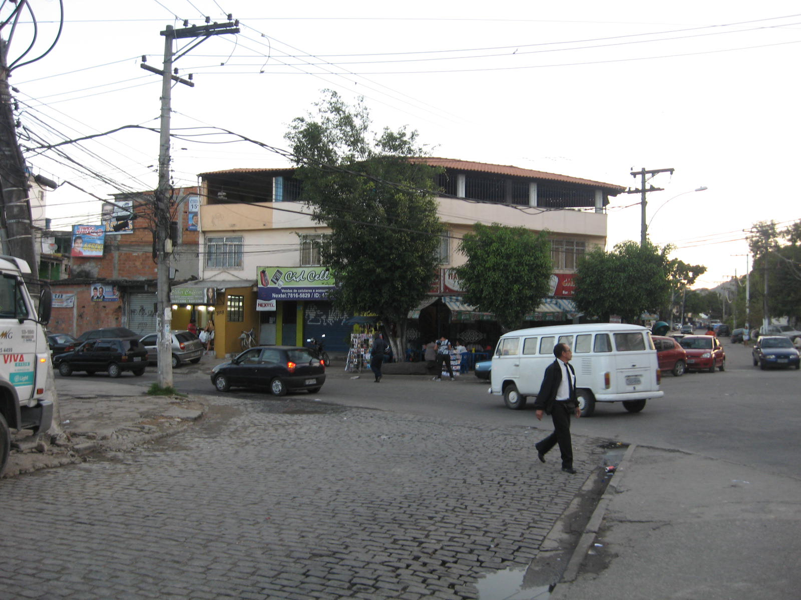 Vista do bairro de Curicica, na cidade do Rio de Janeiro, Brasil.